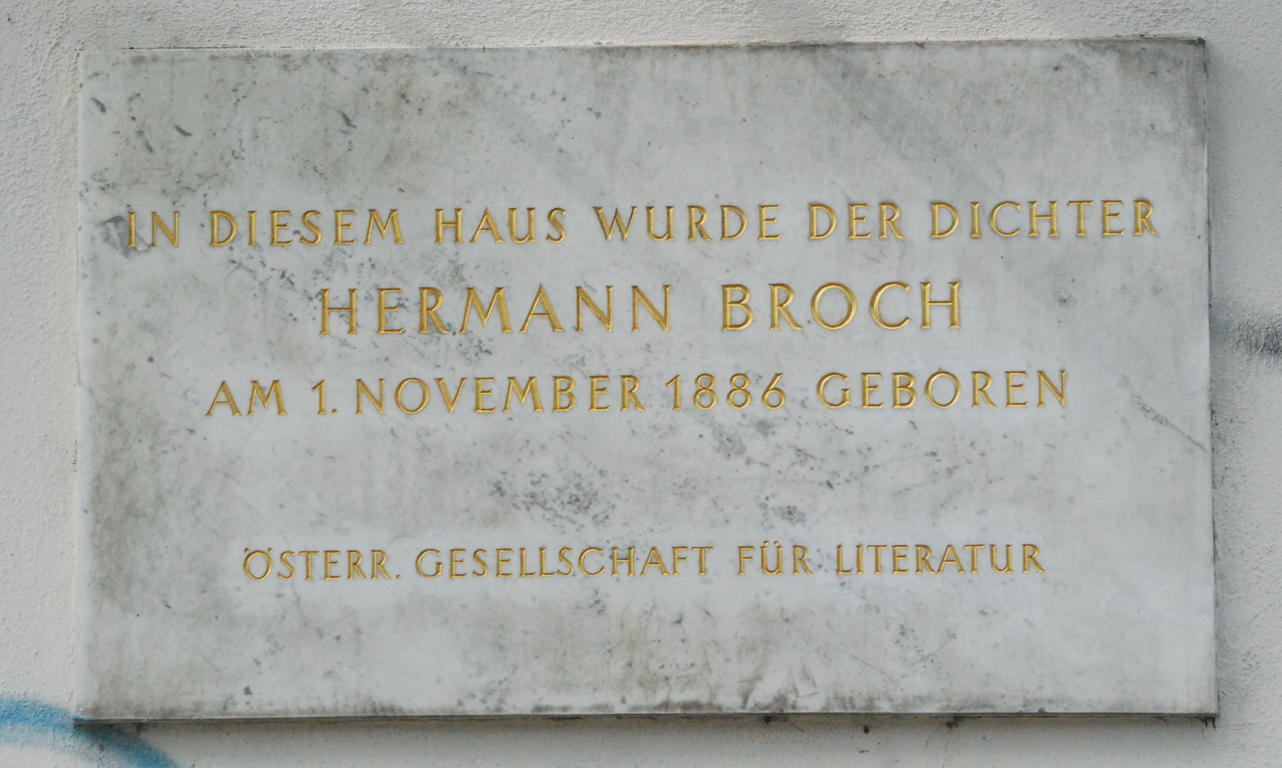 Gedenktafel für Hermann Broch am Haus Franz-Josefs-Kai 37 in Wien-Innere Stadt